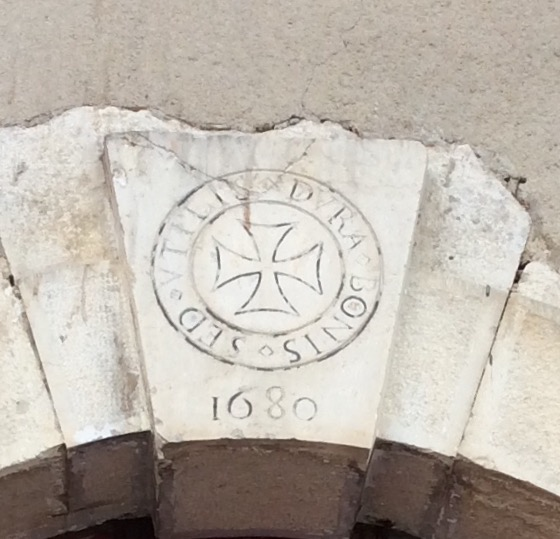 Blason et devise des chartreux de Durbon. Porche gravé sur une maison du bourg.